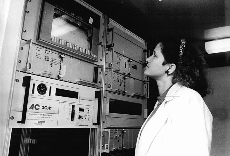 ADN / Wolfried Pätzold / 27.8.90 Schwerin-Smogmessung Nur auf gelegentliche Kontrollen beschränkt sich die Arbeit, die Helga Konietzka, technische Assitstentin für Meteorologie beim Wetterdienst in Schwerin, mit dem kürzlich installierten Smog-Meßcontainer hat. Die vollautomatisch arbeitende Anlage - Bestandteil des im Aufbau befindlichen Smog-Frühwarnsystems in der DDR - liefert die aktuellen Werte stündlich an die zentrale Wetterdienststelle nach Potsdam und an das Umweltbundesamt in Westberlin.